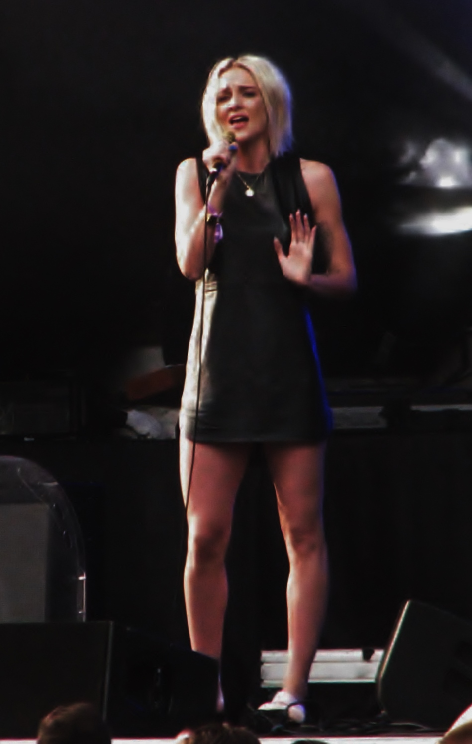 Indiana Positivuse Nordea laval